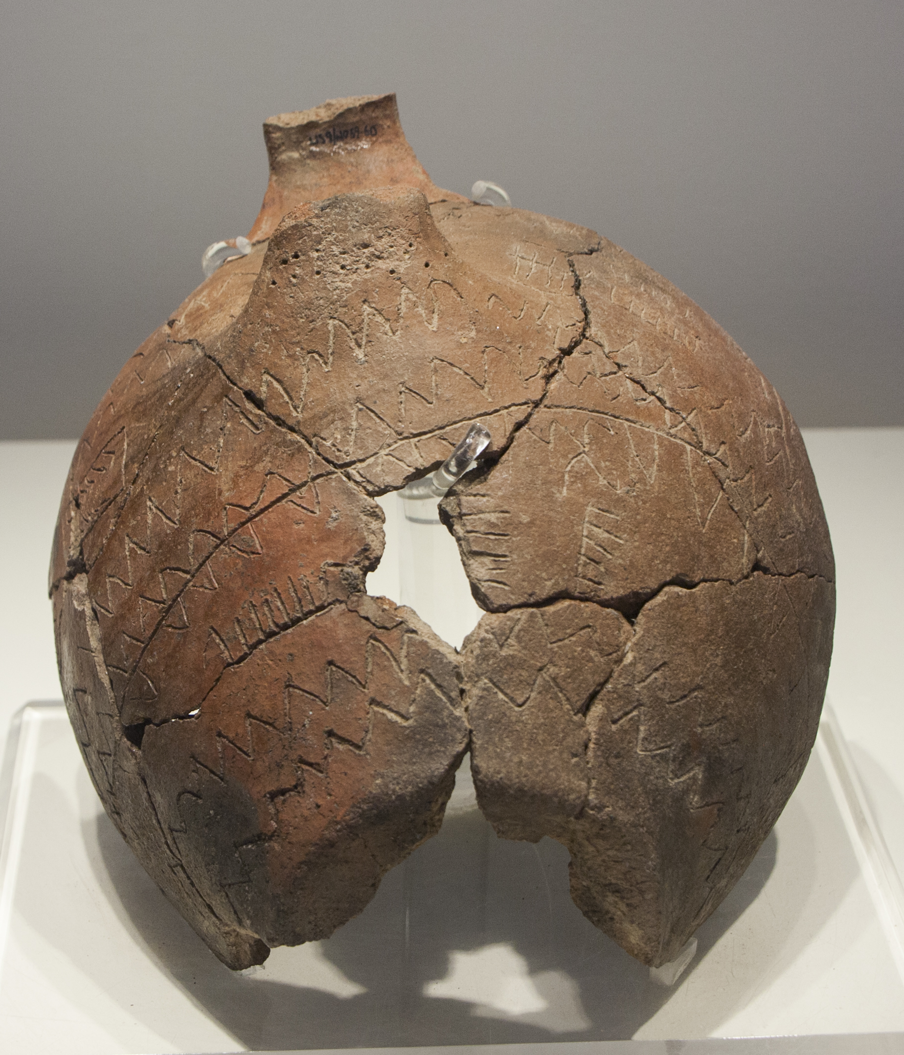 Età del bronzo antico, cultura di Capo Graziano, fase I 2300-1700 a.C. Filicudi, Filo Braccio